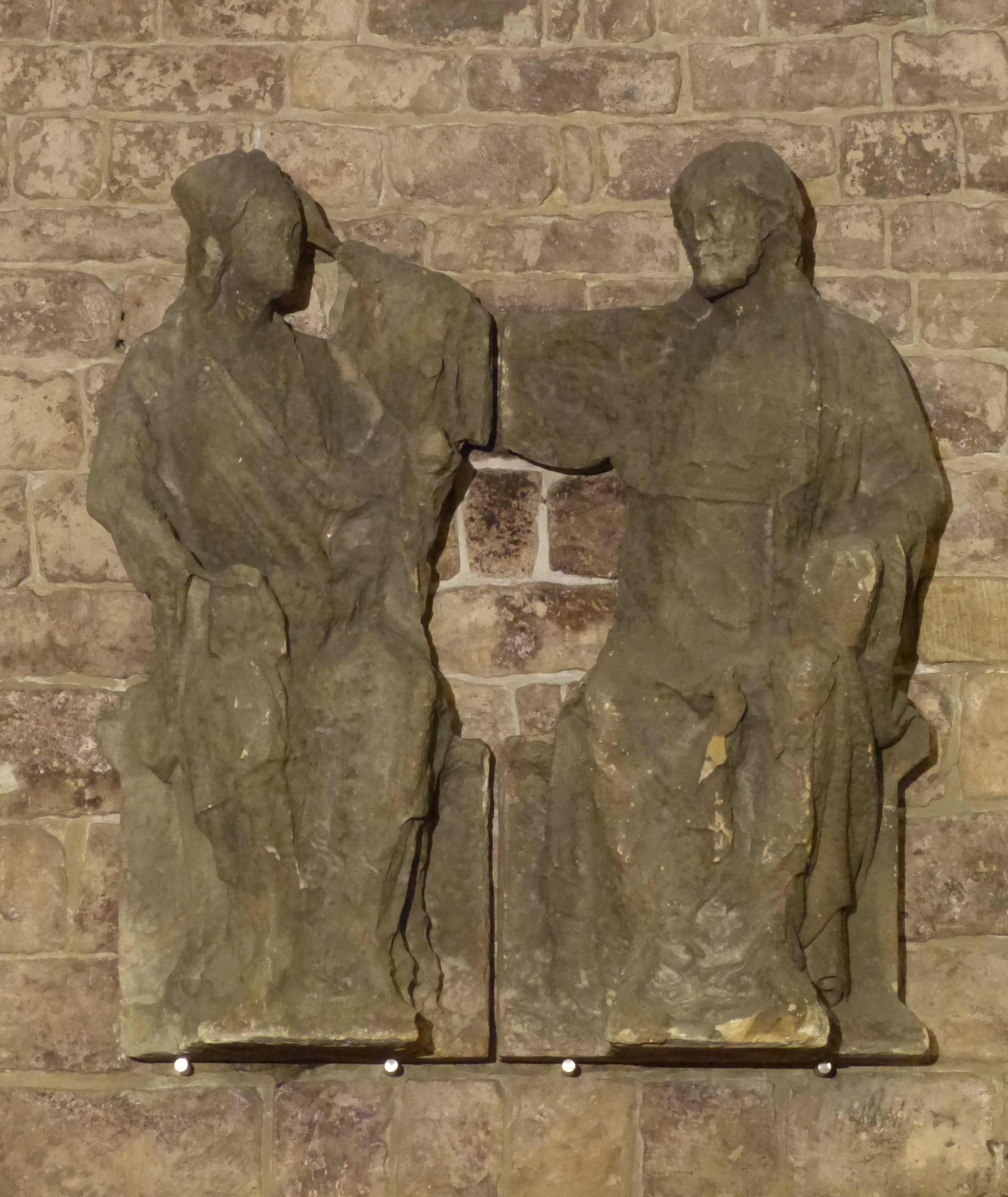 Krönung Mariens, Torso des Reliefs aus dem obersten Feld des Westgiebels, heute in der Ostkrypta (Raum der Stille)